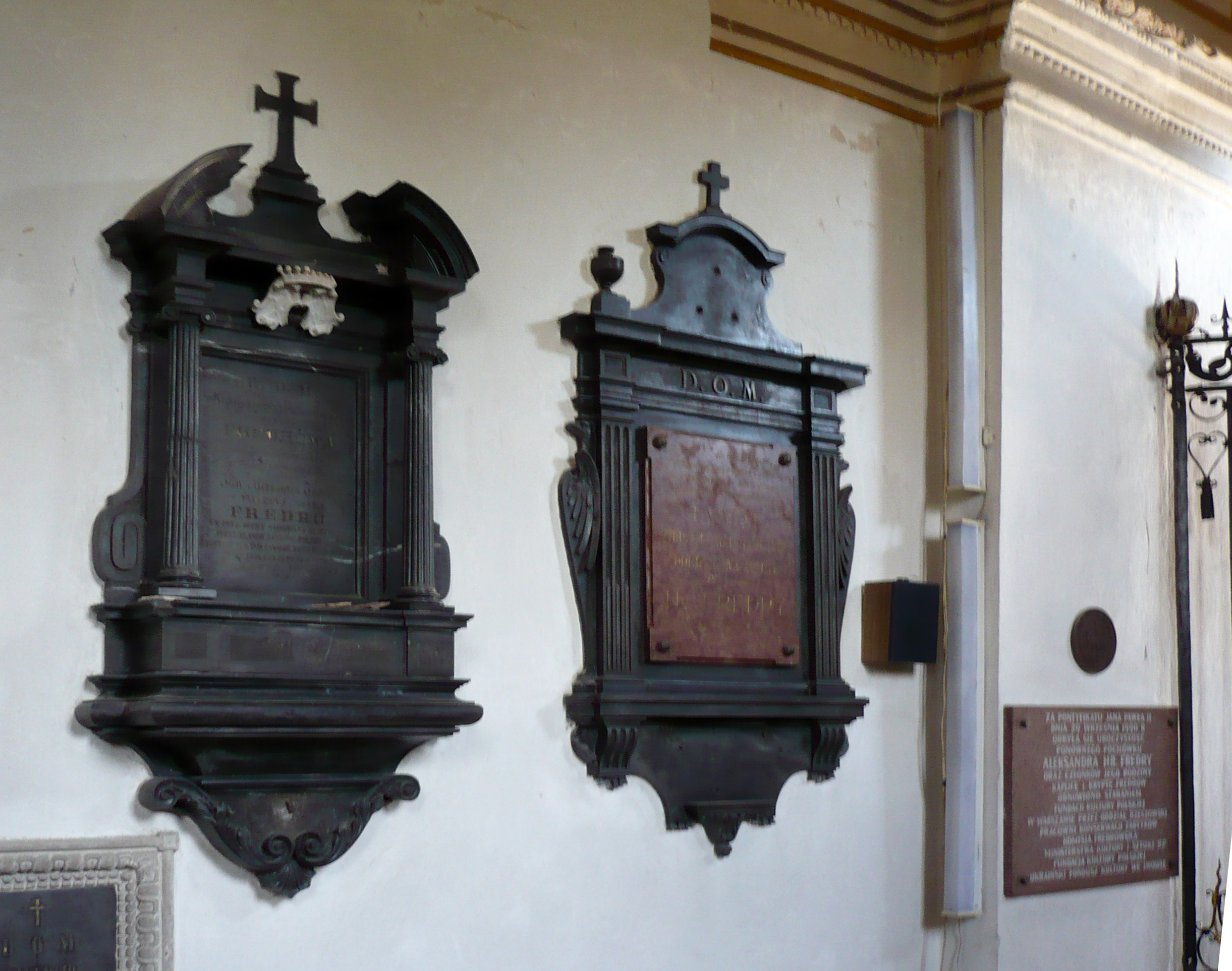 Epitafia Fredrów